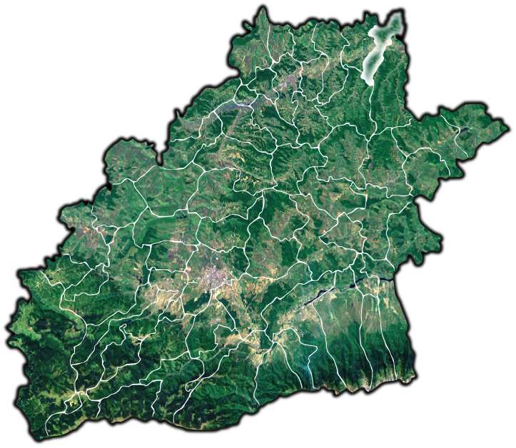 Hoghilag jud Sibiu